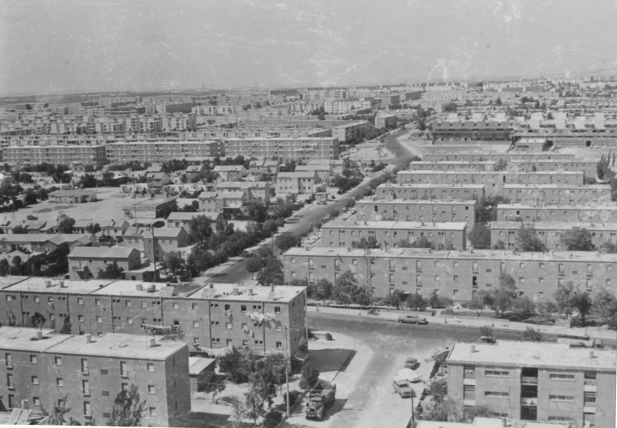 רחוב שמעוני, רחוב ביאליק, רחוב טשרניחובסקי; שכונה ב' - באר שבע.ניתן לראות מימין למעלה את הצטלבות הרחובות טשרניחובסקי ומצדה ואת מרכז הנגב. ככל הנראה התמונה צולמה מבניין ה-14 קומות שנבנה ב-1966.